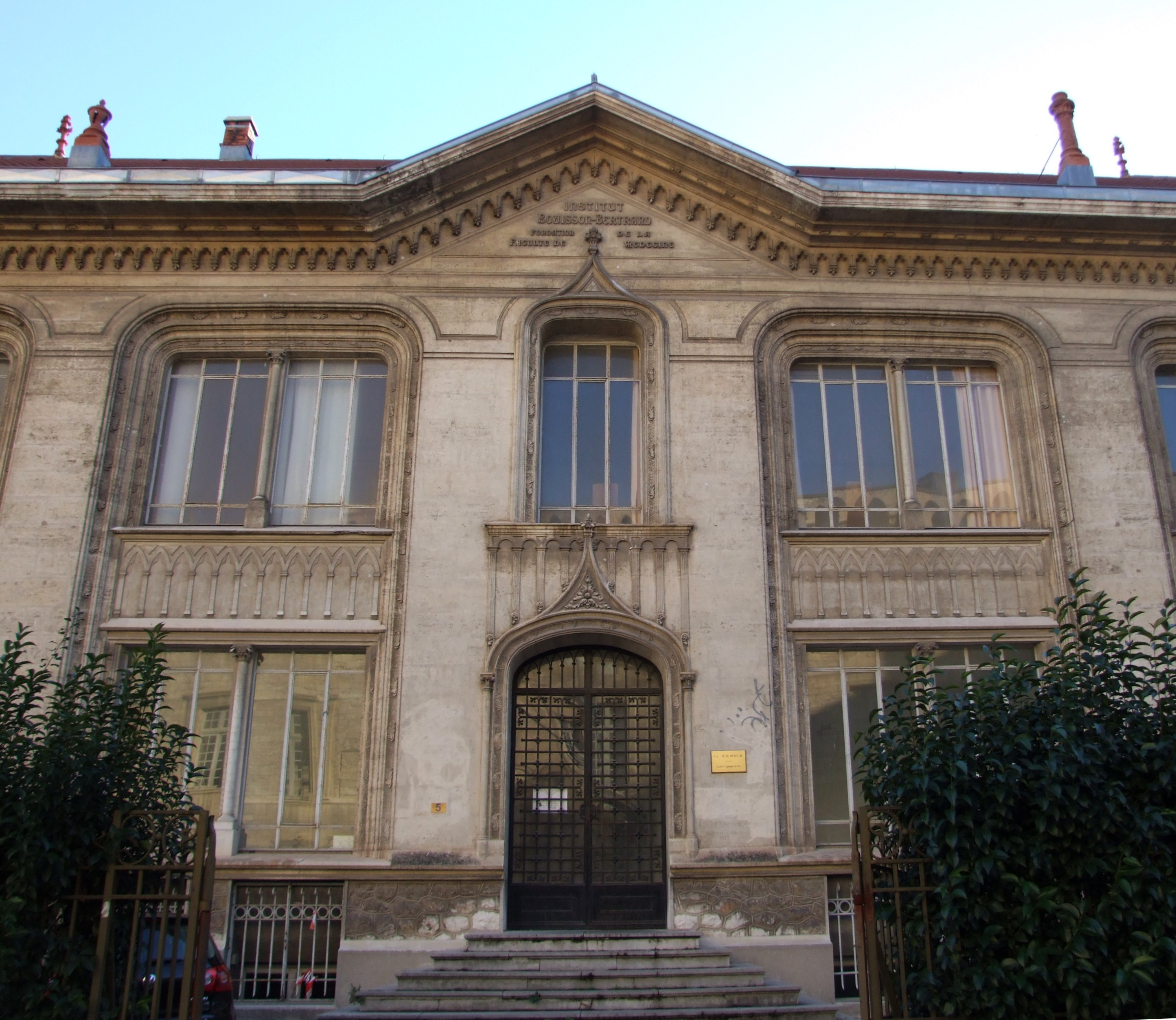 Ancien bâtiment de l'Institut Bouisson Bertrand, réalisé par l'architecte Edmond Leenhardt à Montpellier (Hérault).